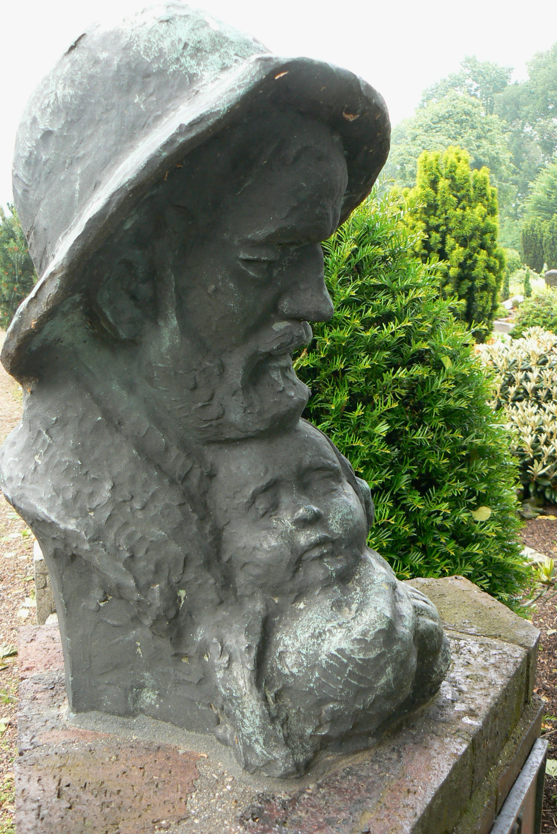 Peter August Böckstiegel, Skulptur in Werther